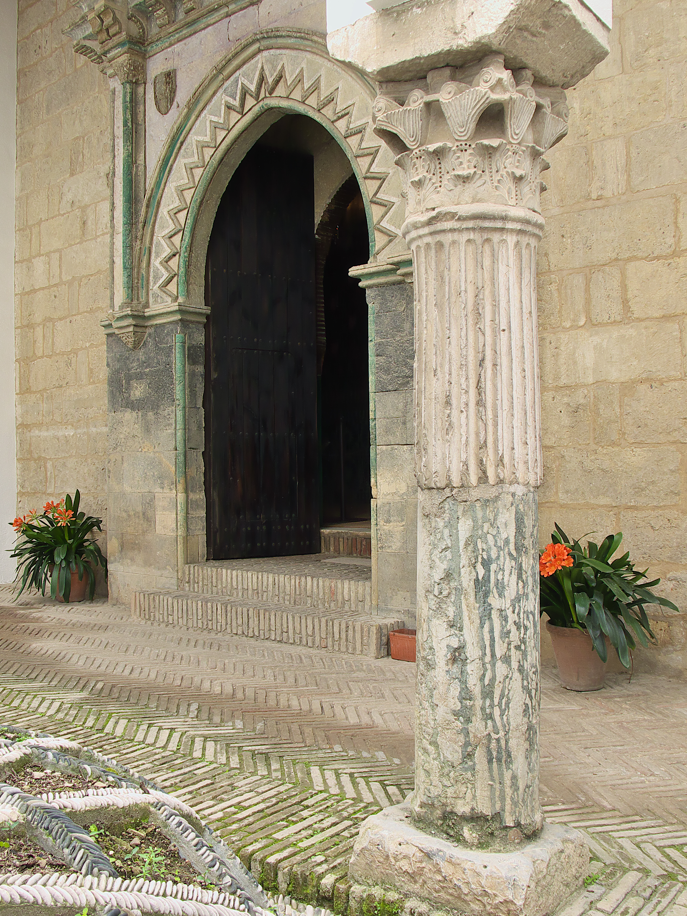 Sicilianu: Hospital de Agudos (Córdoba). Portada de la capilla y pórtico con una columna estriada y bello capitel visigodo. Este pórtico es de construcción posterior a la capilla. Sin documentación, la cantería de la capilla gótico-mudéjar es datable en el último tercio del siglo XIII. Posibilidad de estar destinada a función funeraria, y en tema de discusión, promovida por el Condestable don Ruy López Dávalos.